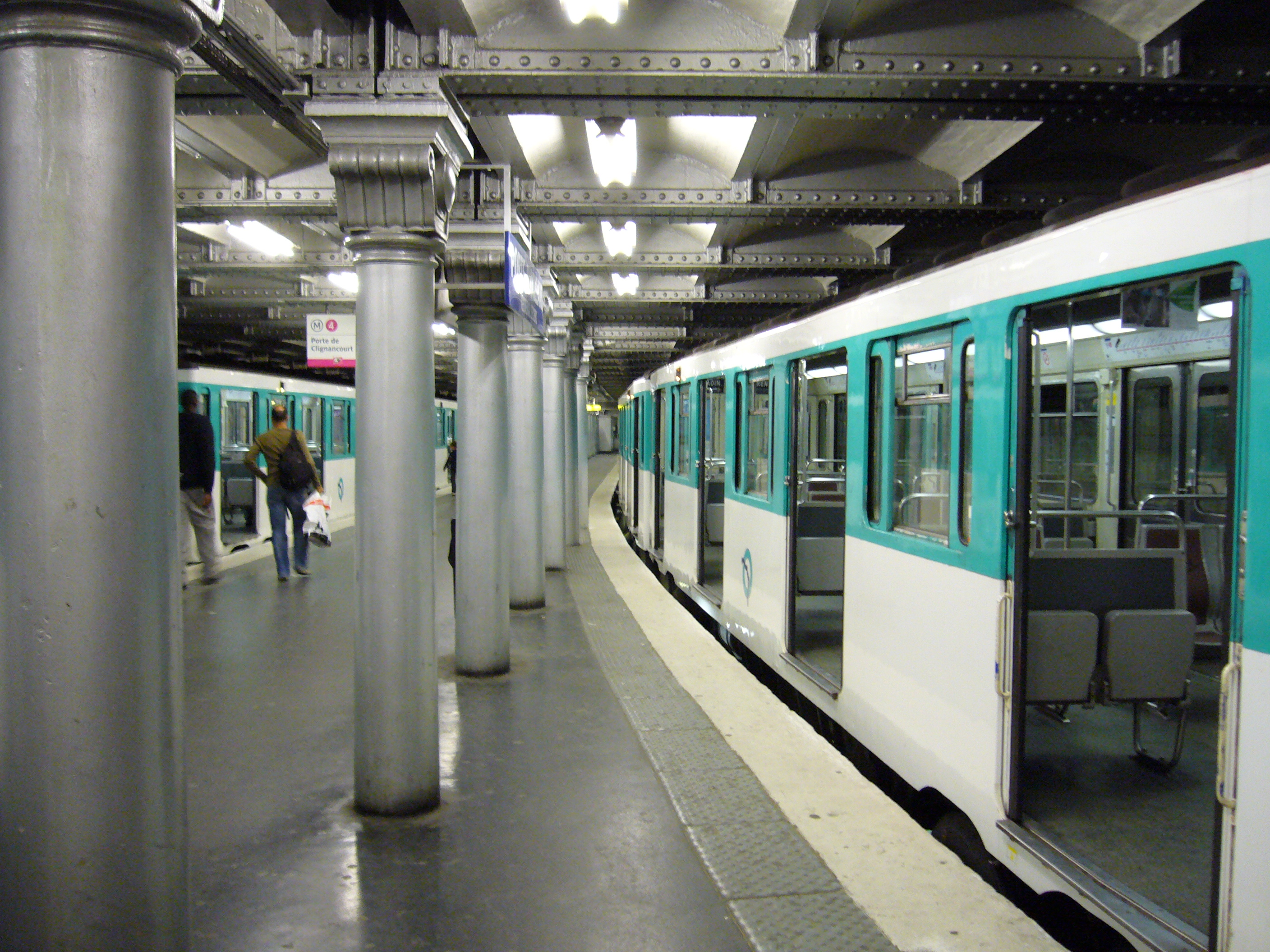 Quai central de la station Porte d'Orléans de la ligne 4 du métro de Paris.